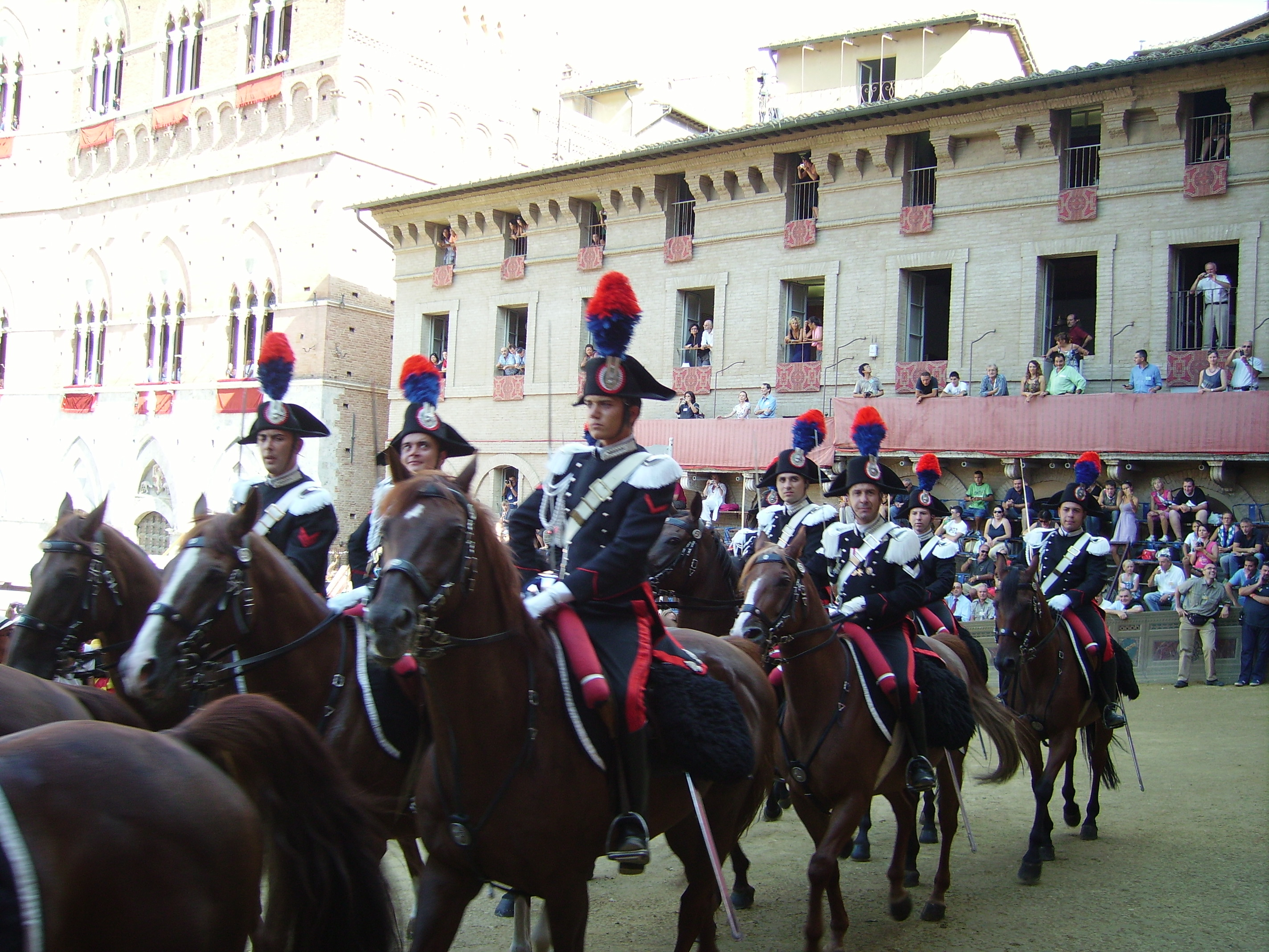 Cavalry